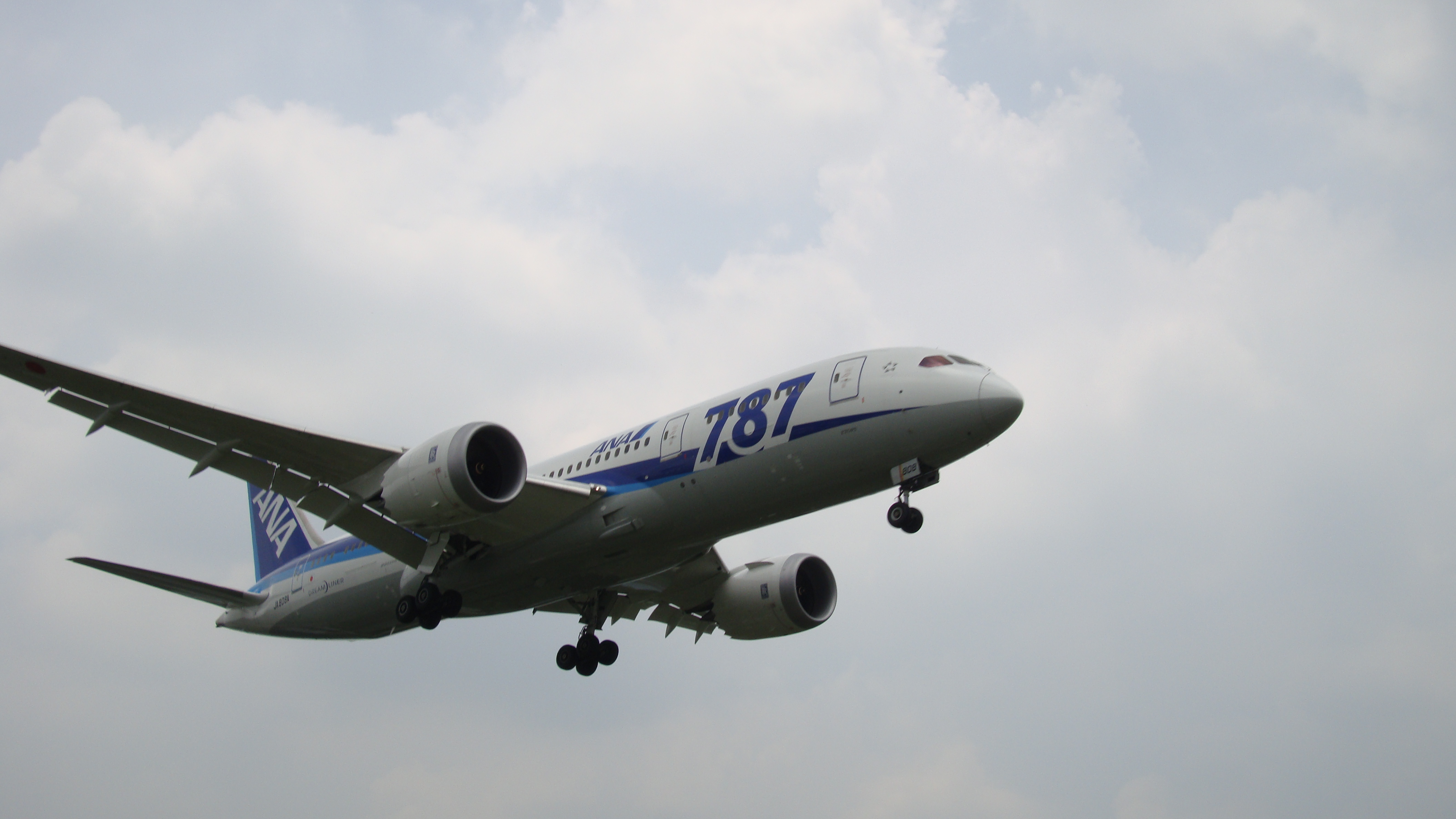 中文（台灣）: 2013年6月1日，全日空波音787 JA808A首航台北並即將降落台北松山機場。